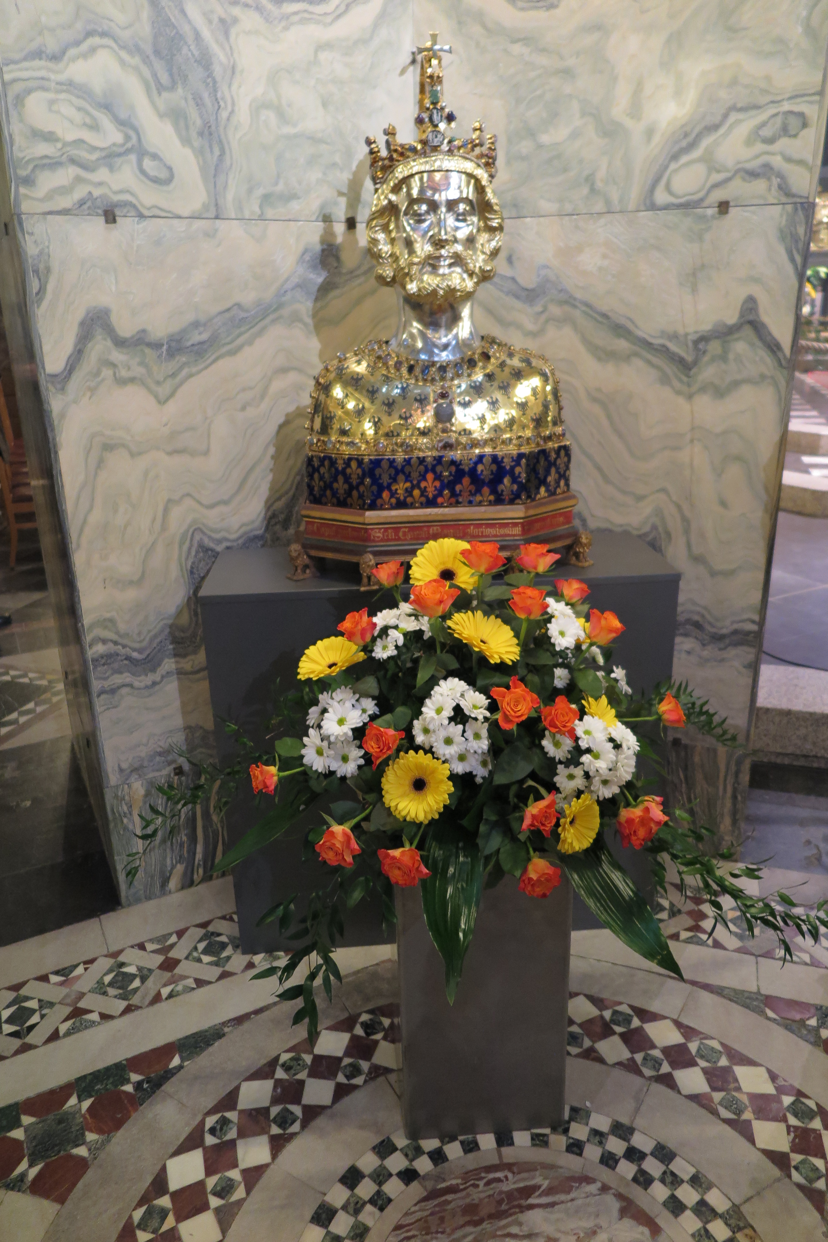 Die Büste von Karl dem Großen während des Pontifikalamtes zur Feier des Karlsfestes am 25. Januar 2015 im Aachener Dom.